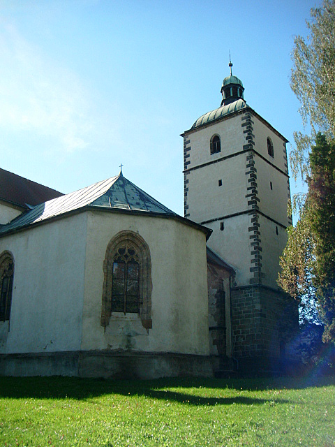 Kostel Narození P. Marie (Benešov nad Ploučnicí), Benešov nad Ploučnicí